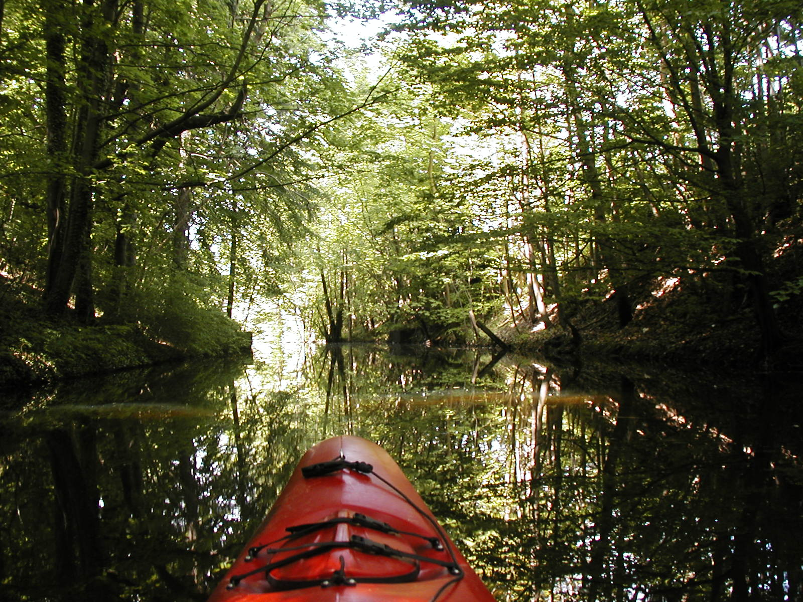 Mit dem Kajak auf der Schwentine durch Malente.